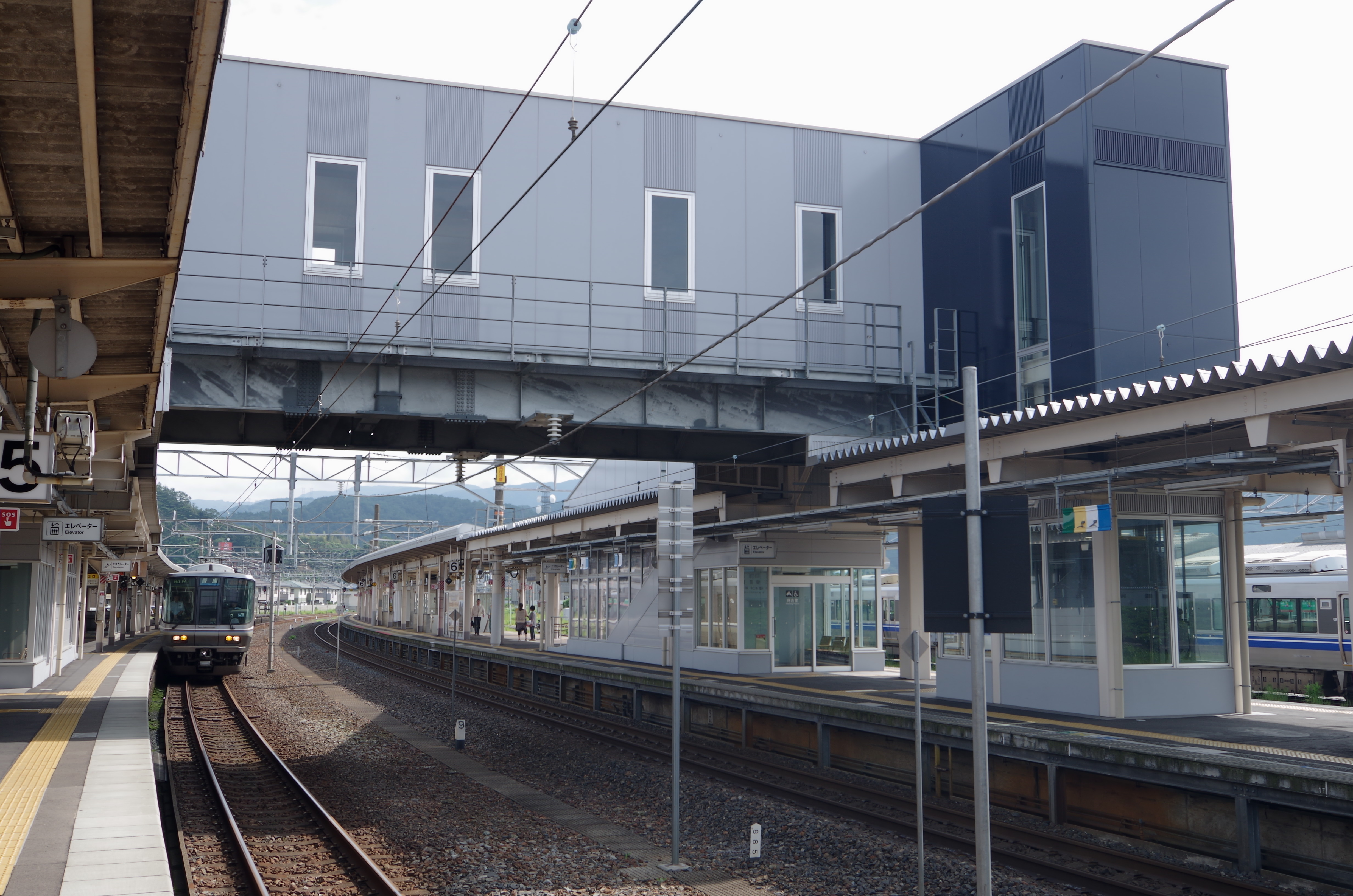 JR北陸本線 敦賀駅 Tsuruga sta. 2014.8.25